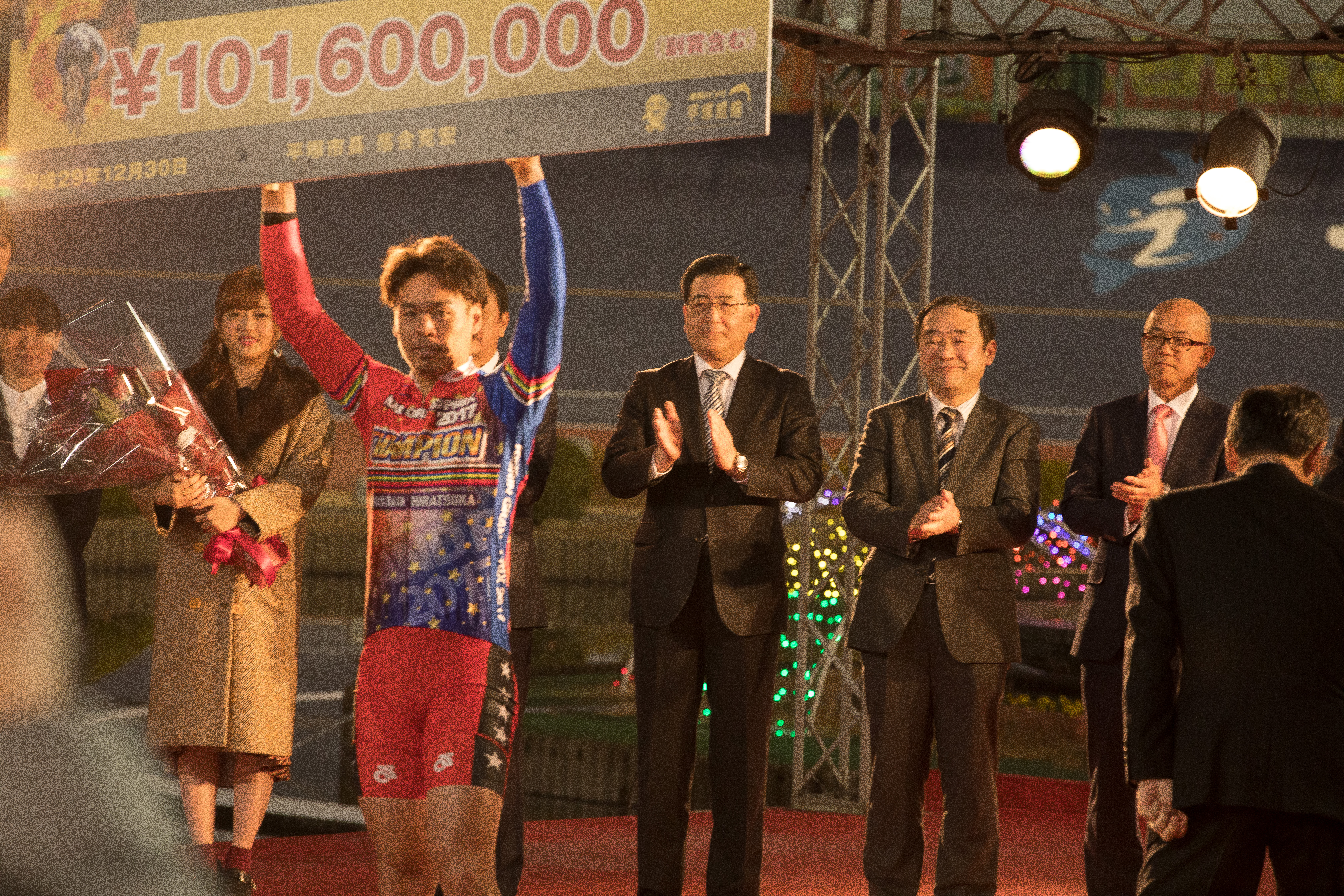 KEIRINグランプリ2017 表彰式 菊地亜美 浅井康太